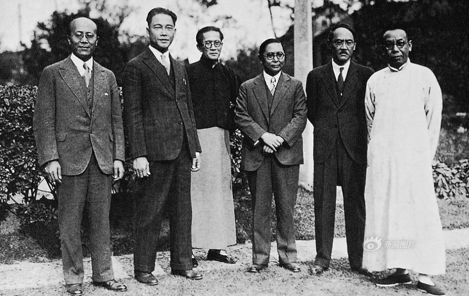 1931年5月27日，反蒋派在广州成立国民政府。图为广州国民政府部分委员，左起：伍朝枢、汪精卫、李文范、孙科、陈友仁、邹鲁。